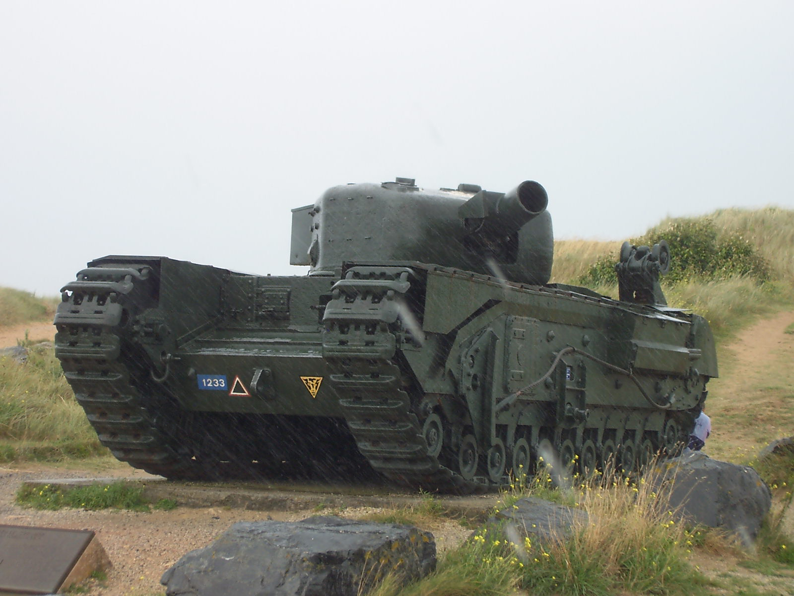 mezzo fotografato in Normandia, tipo Churchill mk5 con mortaio 290mm